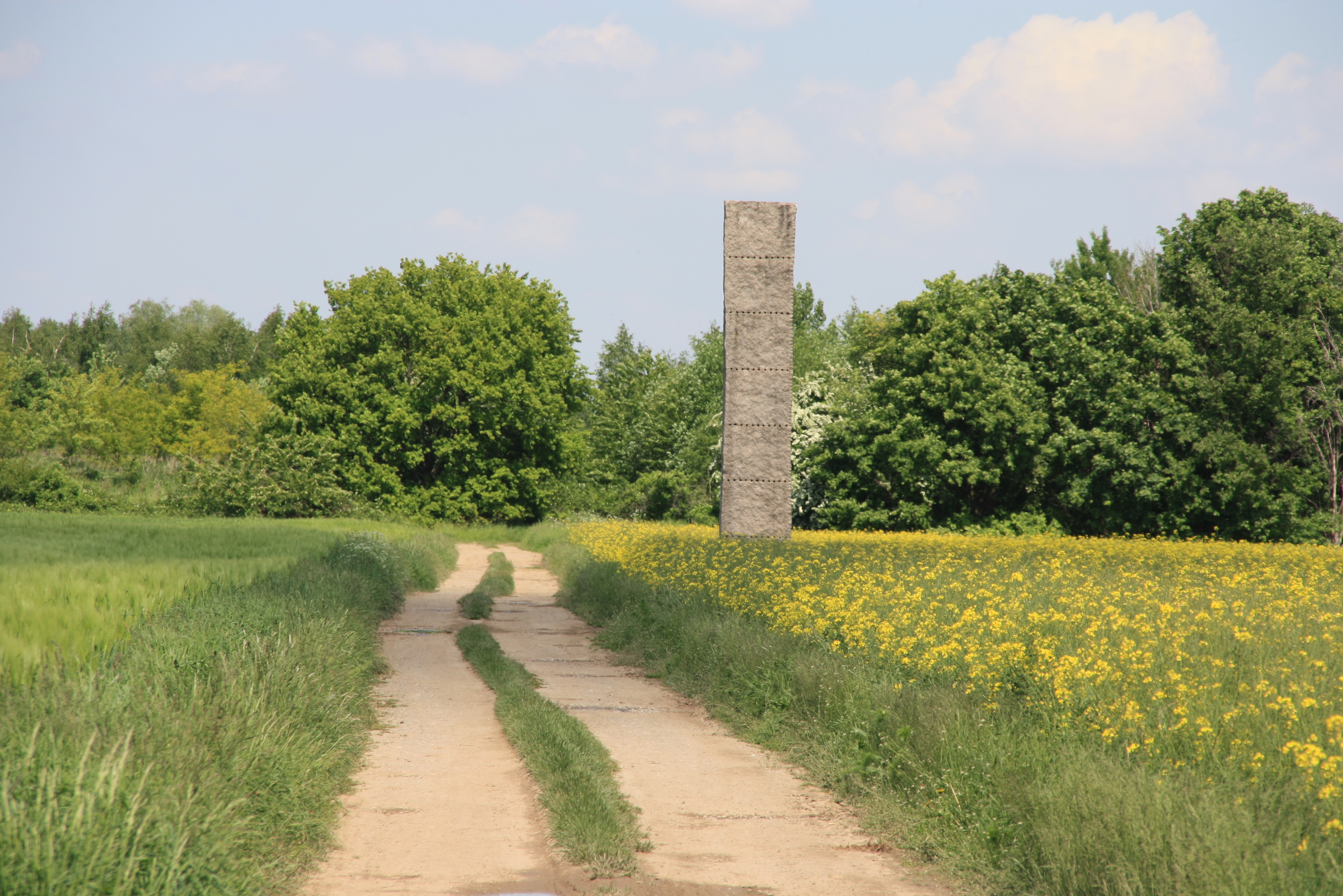 Die Chlodwigstele bei Zülpich-Langendorf